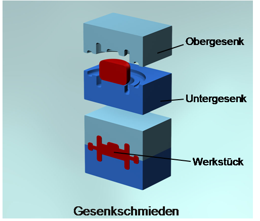 Grafik Gesenkschmieden